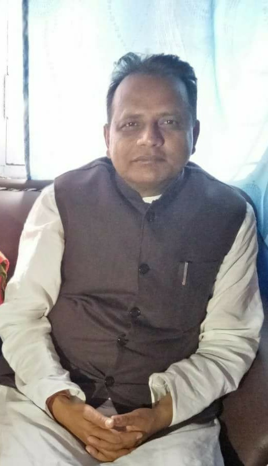 During Meeting in janakpur